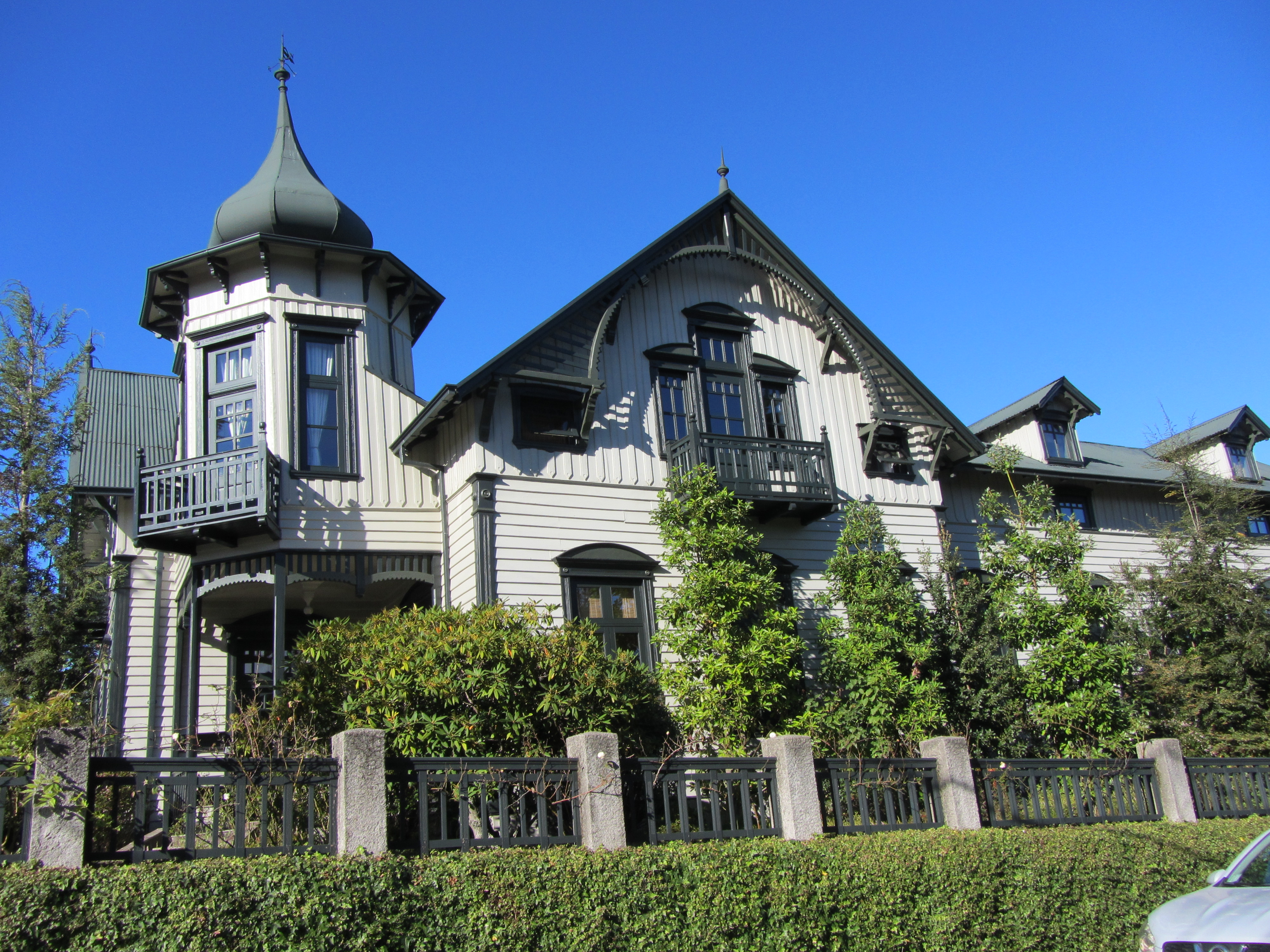 La casa Kuschel en Puerto Varas, monumento histórico This is a photo of a national monument in Chile: 722